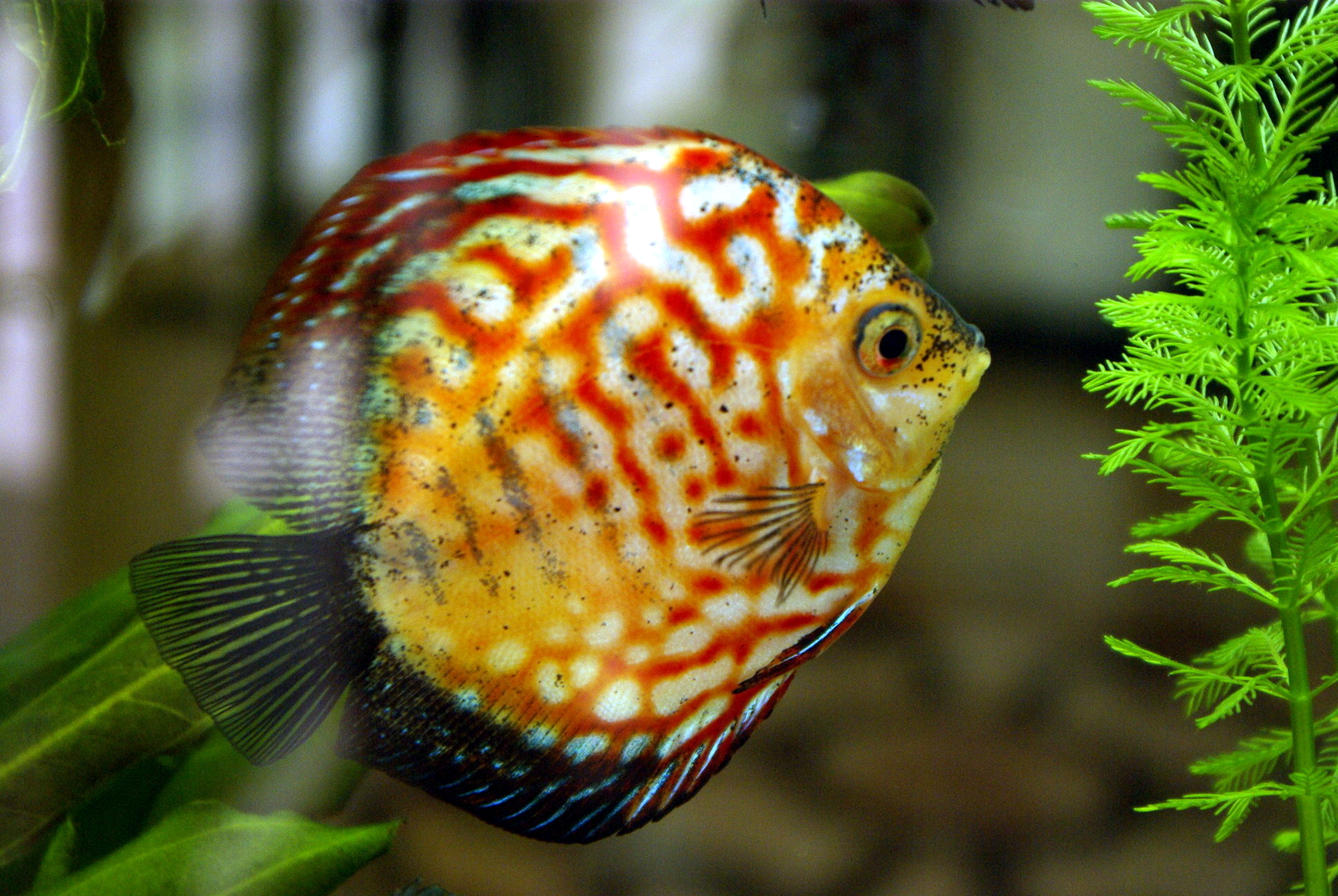 Symphysodon hybrid - Beijing, China